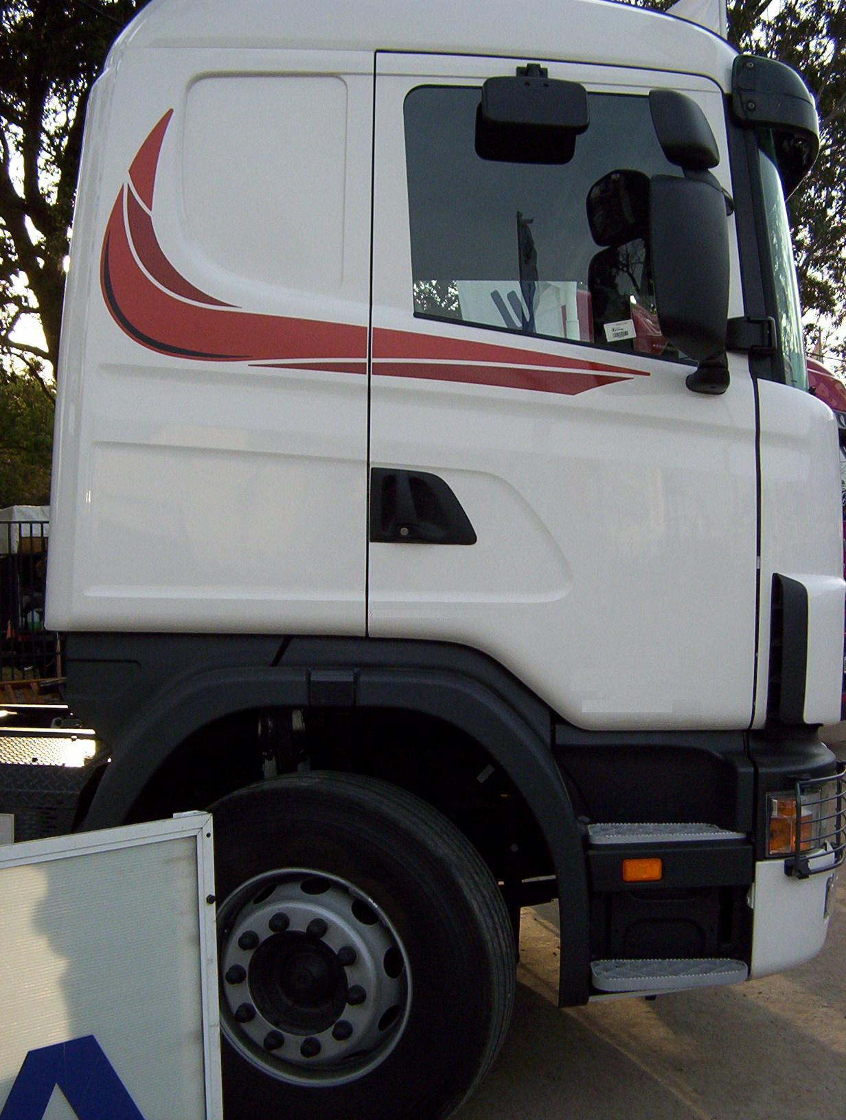 merienda familiar en la playa